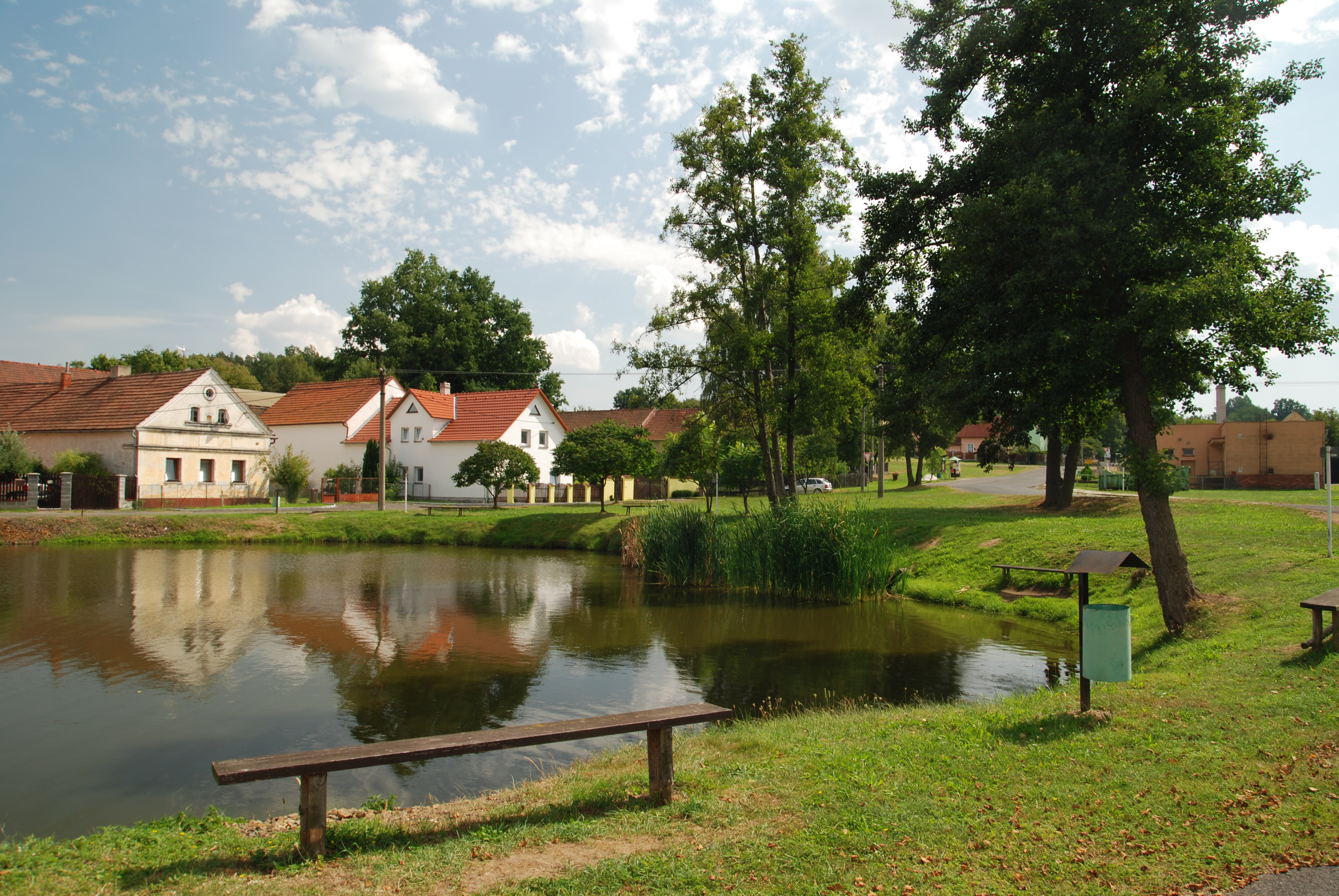 Domky u rybníka